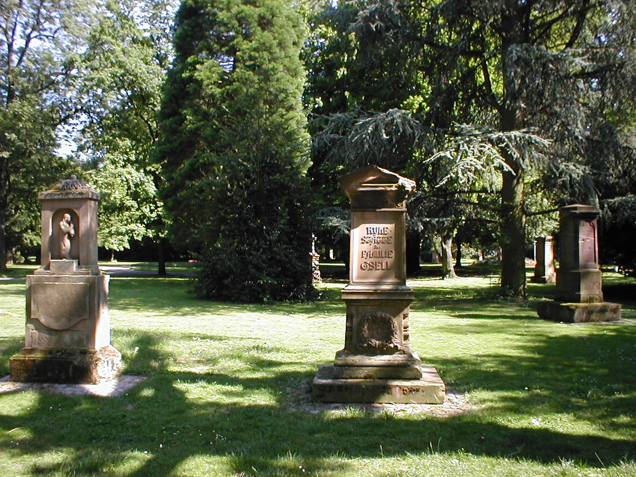 Grabmale im Alten Friedhof in Heilbronn, angelegt 1539, Park seit 1882